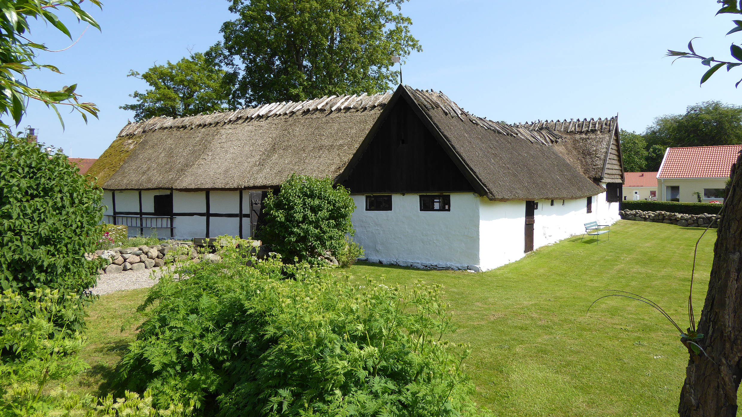 Byagården i Tomelilla, Skåne.